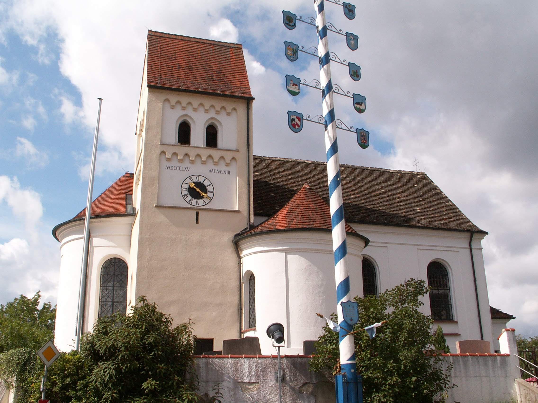 Kirche in Beuern, Greifenberg